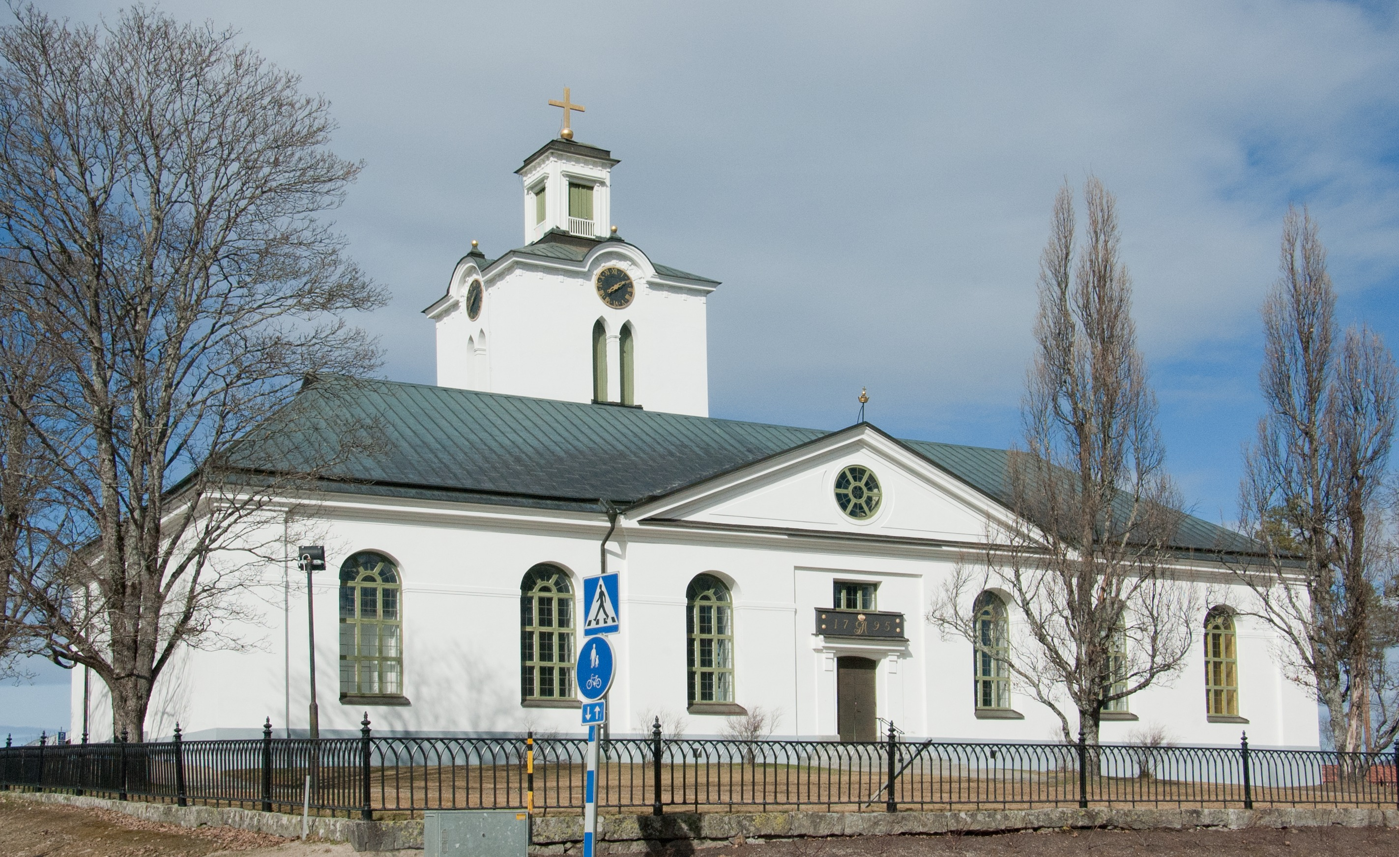 Rengsjö kyrka